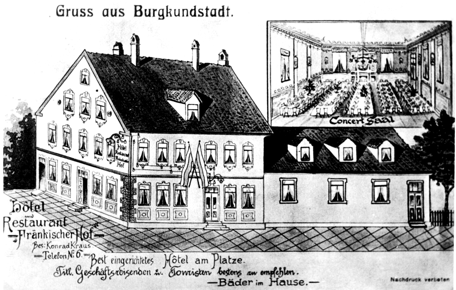 Postkarte des "Fränkischen Hofes" am Weihersbach in Burgkunstadt, in dem 1935/36 die "Bank-Lichtspiele" eröffneten.